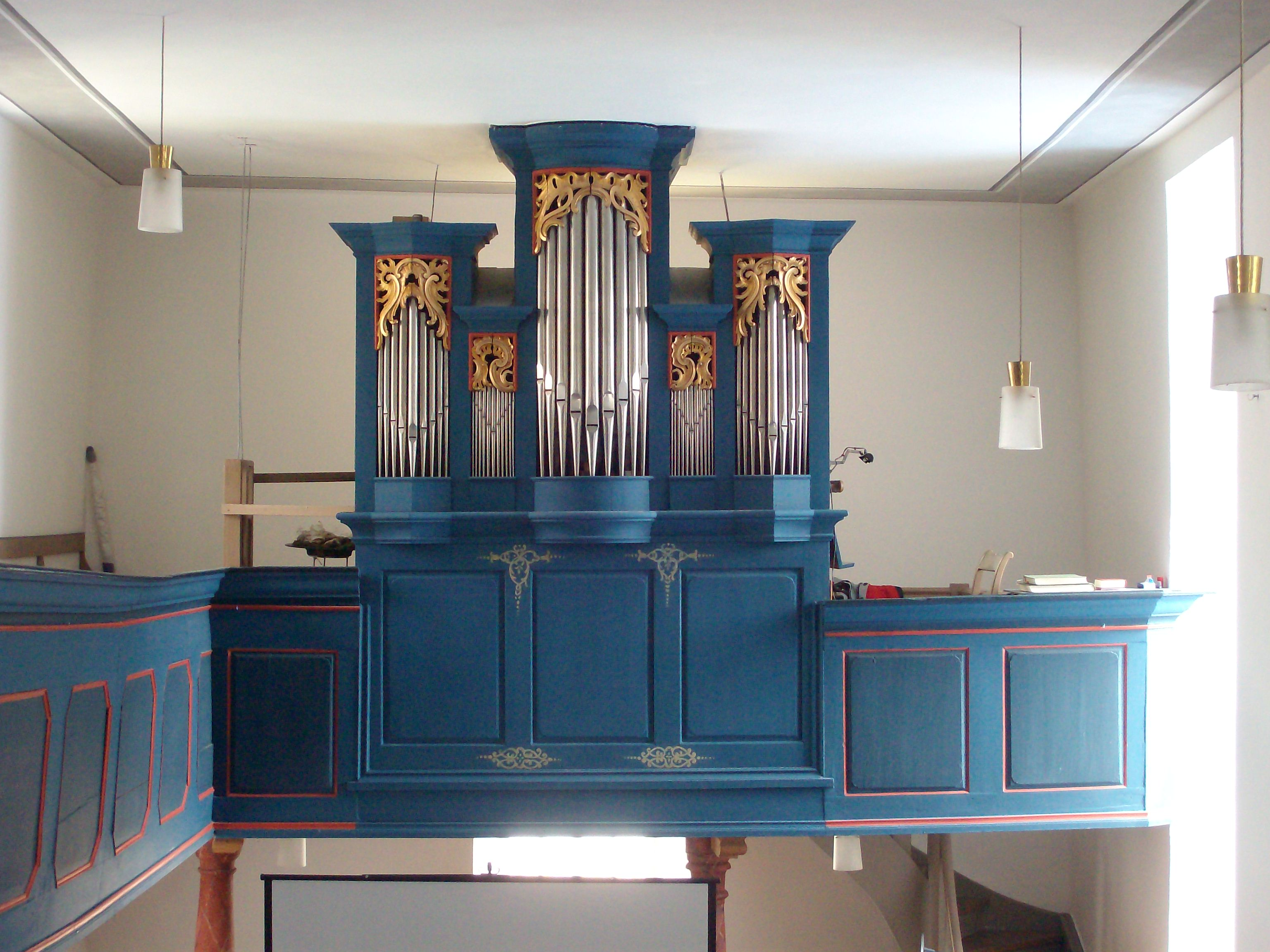 Orgel in Kirchgöns, Butzbach, Hessen